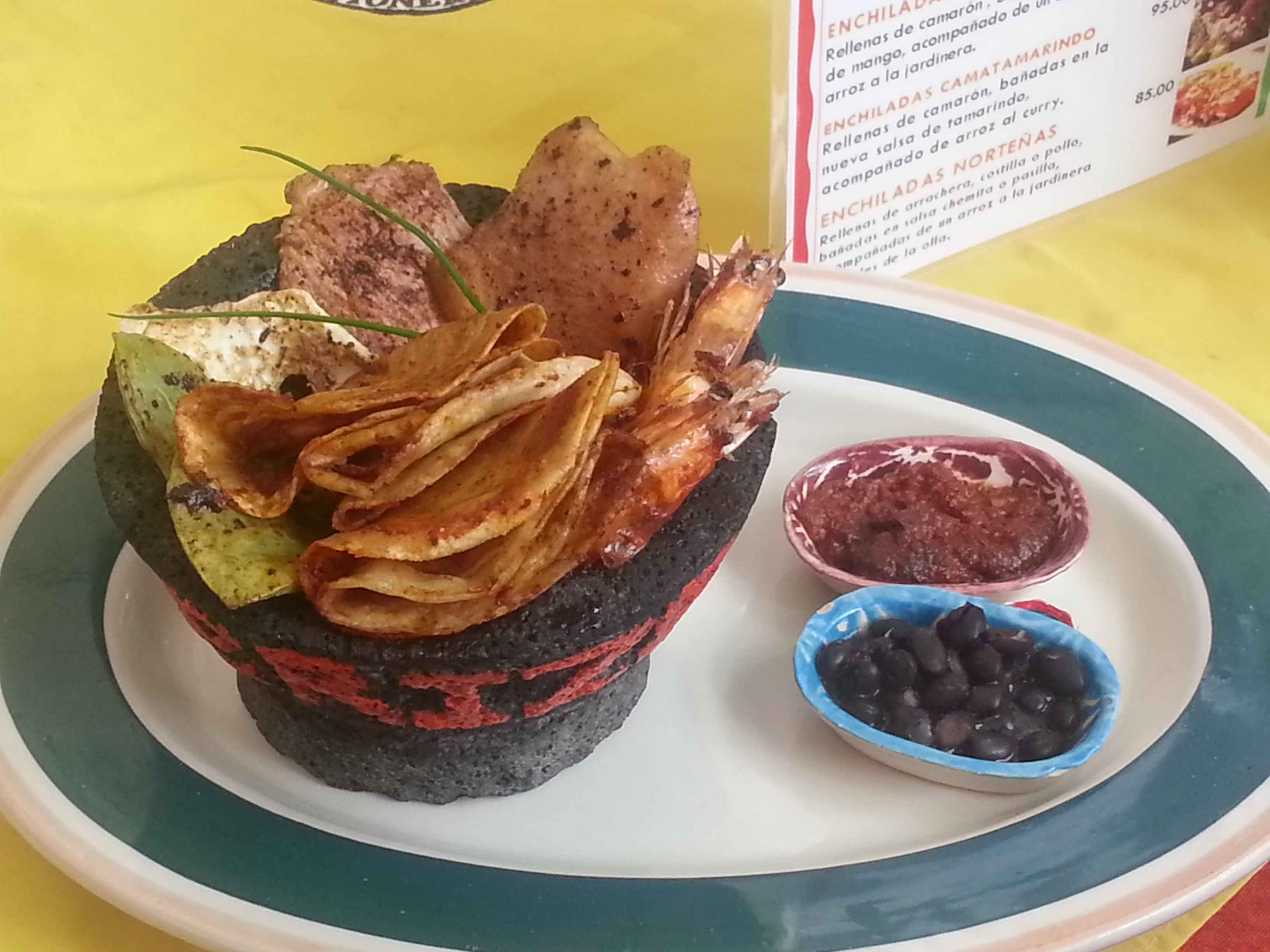 Molcajete con carne, tortillas de harina, frijoles refritos y frijoles negros, nopales asados y salsa. Feria Gastronomica de la Enchilada Iztapalapa